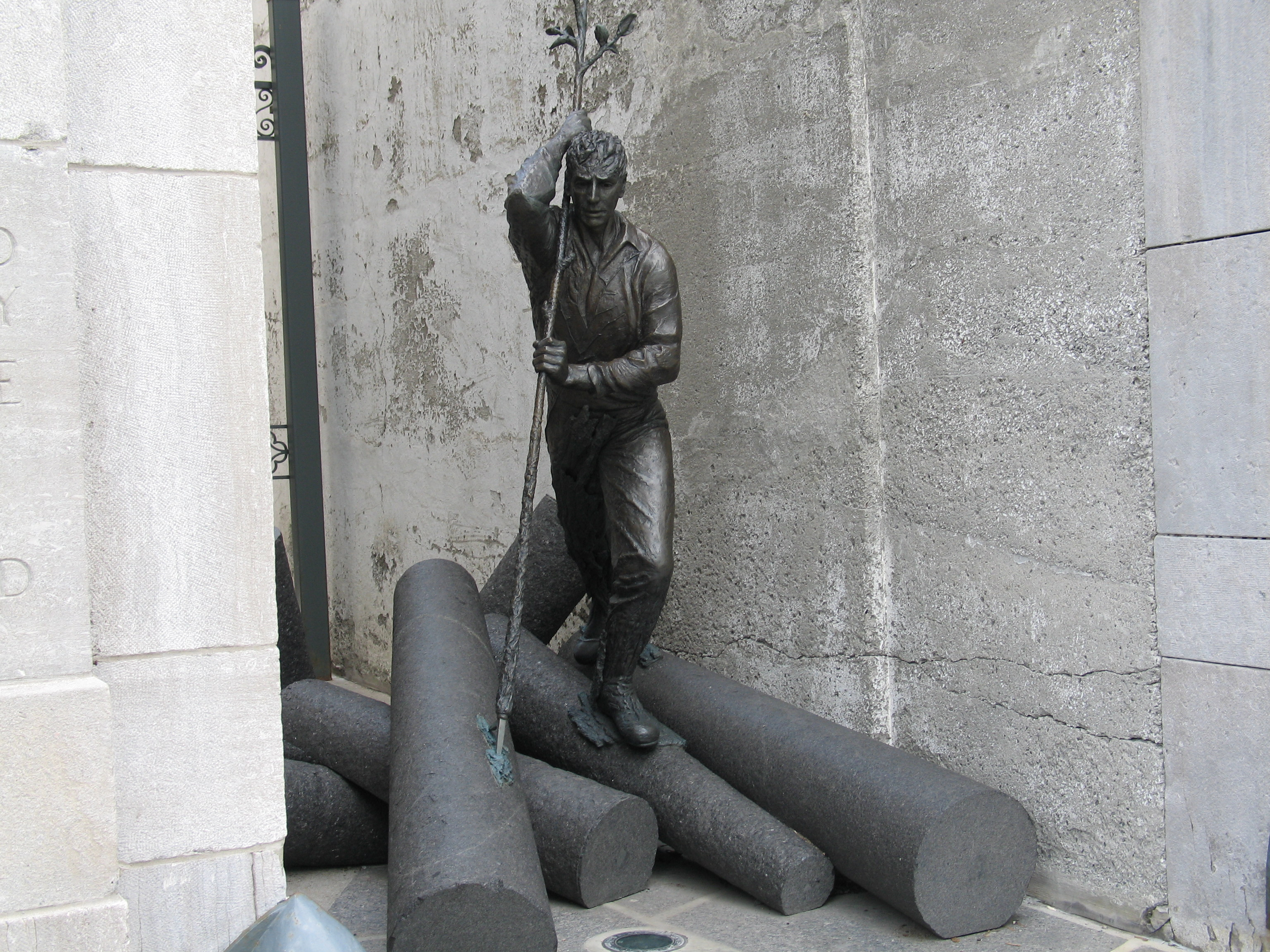 Le monument L'Homme-rivière rend hommage aux draveurs. Il est situé entre le 67 et le 71, rue Sainte-Anne, à côté de l'Édifice Price, dans le Vieux-Québec. Inauguré en 2002, le monument est une oeuvre de Catherine Sylvain et Lucienne Payan-Cornet.